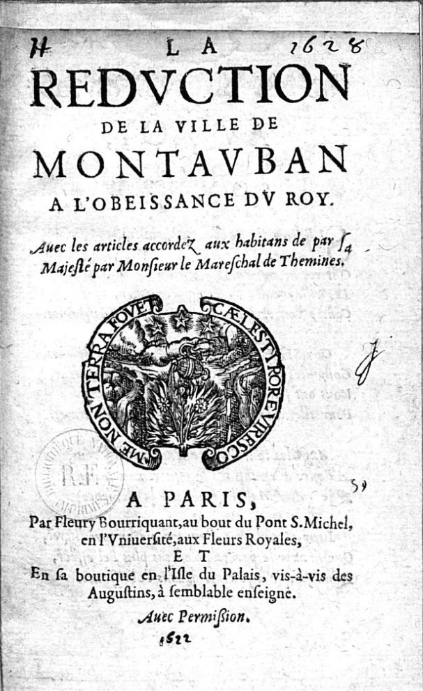 La réduction de la ville de Montauban à l'obéissance du roy, maréchal de Thémines, 1622.